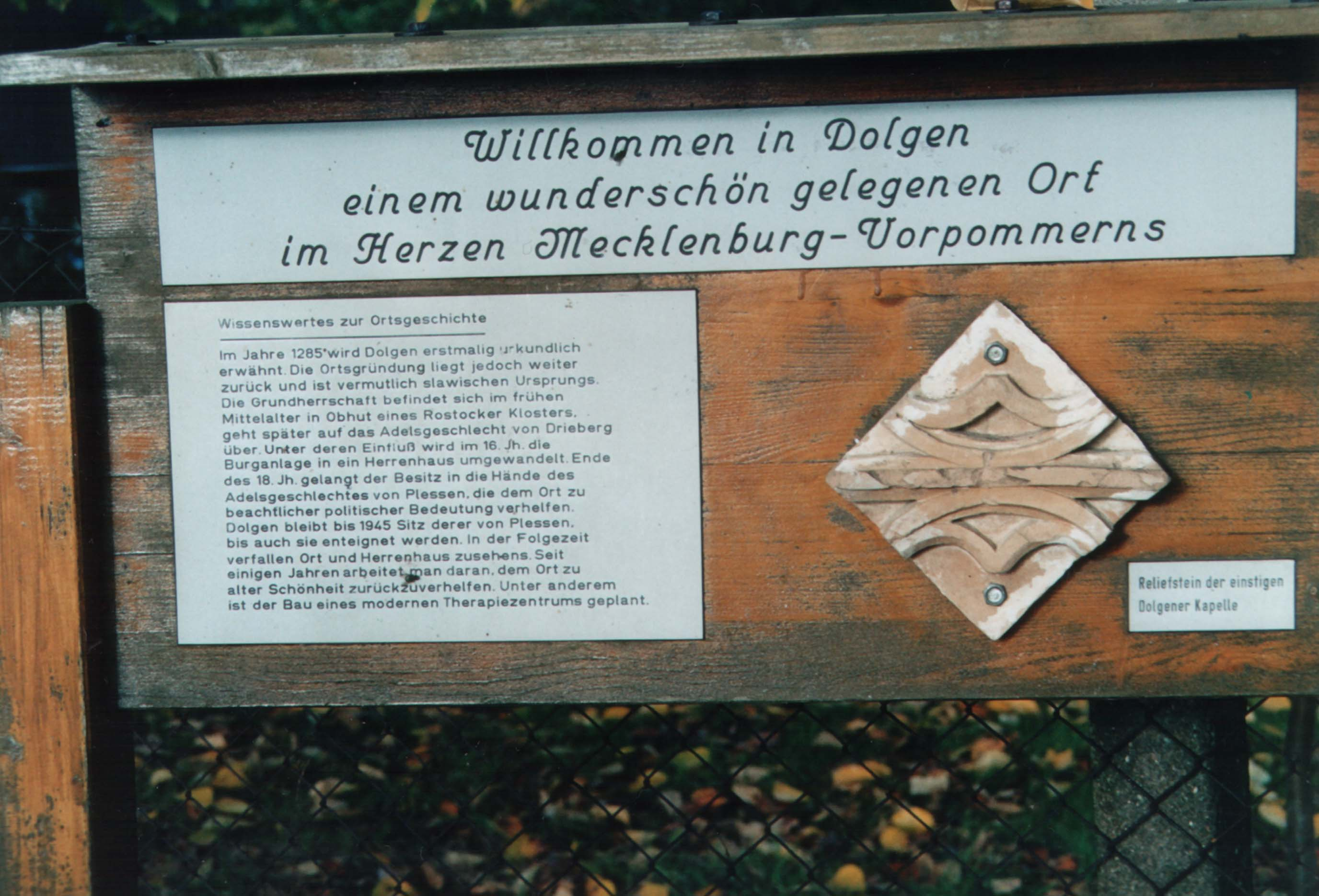 freundliche Begrüßungstafel am Ortseingang Dolgen am See Datum: 10/2003 Urheber: Michael Pfeiffer alias Benutzer:Gordito1869 Quelle: privates Fotoalbum